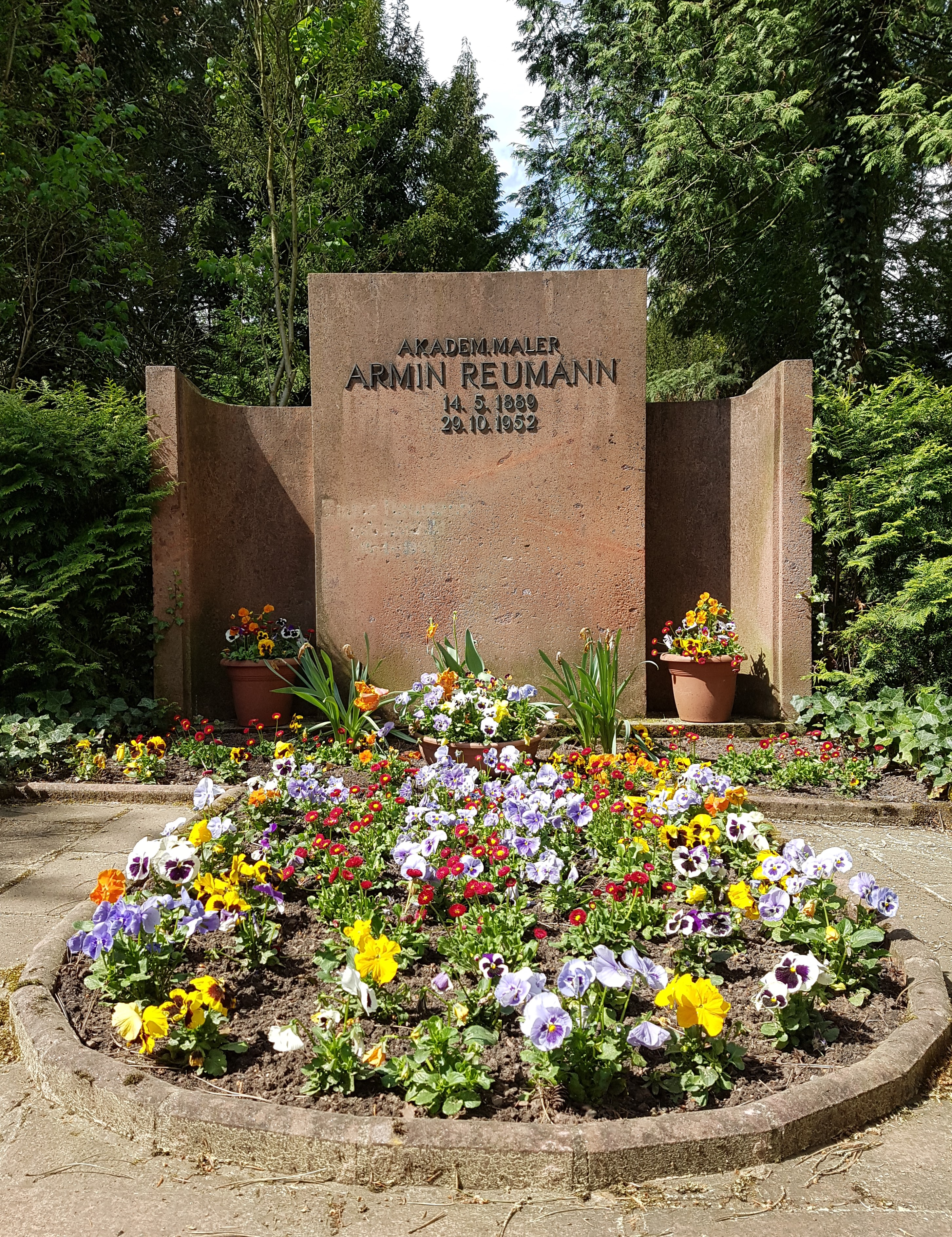 Armin Reumanns Grab